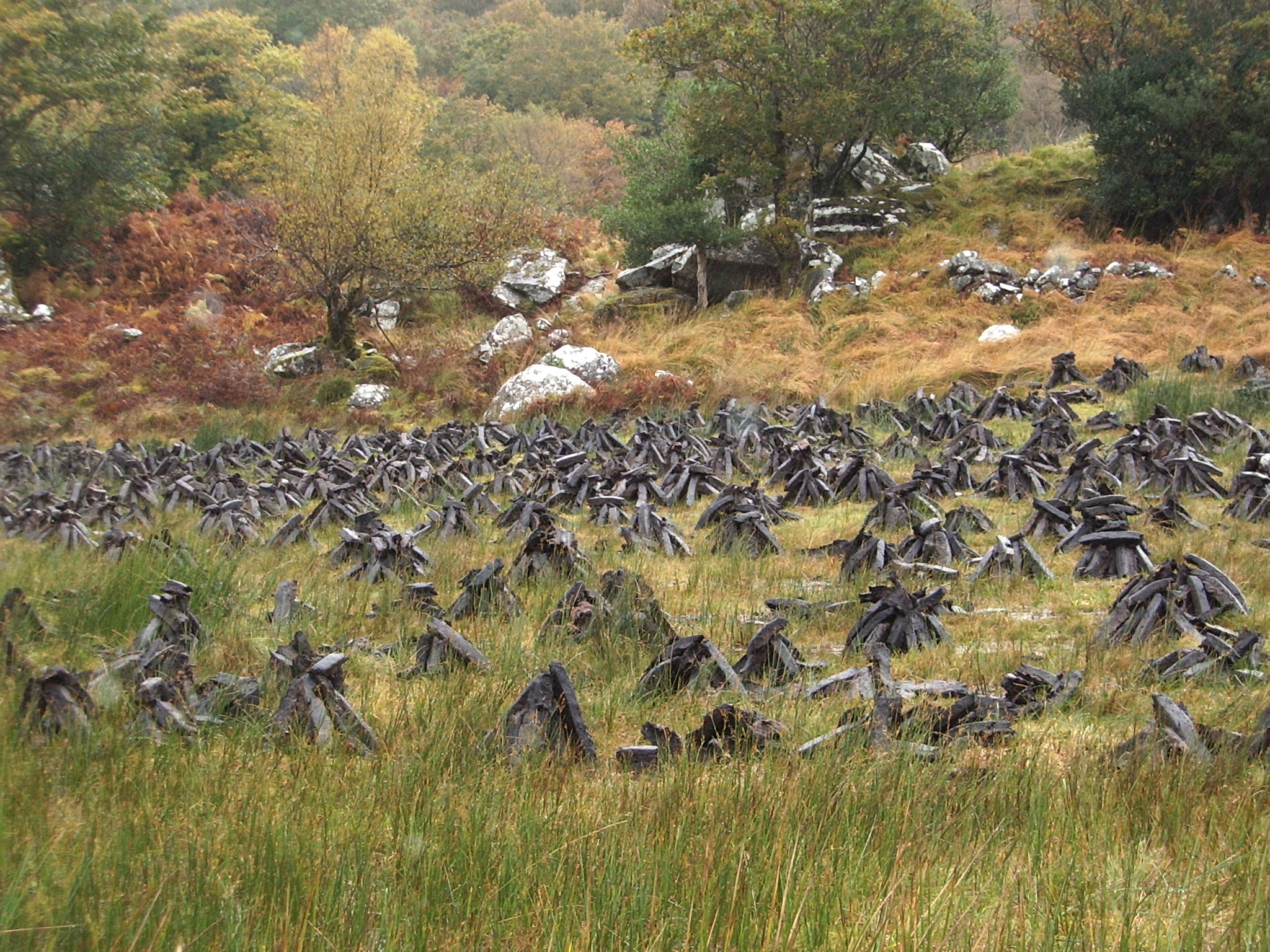 Mottes de tourbe séchant en Irlande